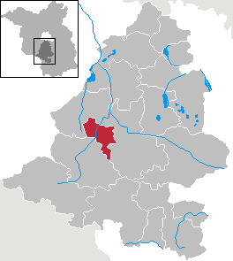 Luckenwalde in Brandenburg (Country) - District Teltow-Fläming